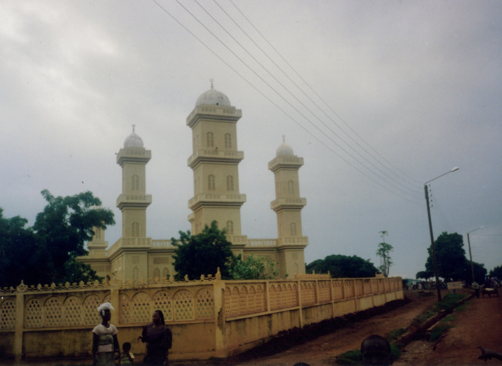 Mosquée de Korhogo (nord de la Cote d'Ivoire)